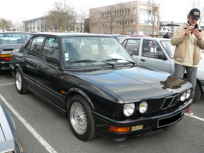 Reims 2012